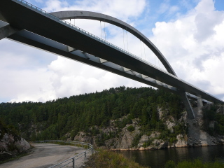 Svinesund Bridge.